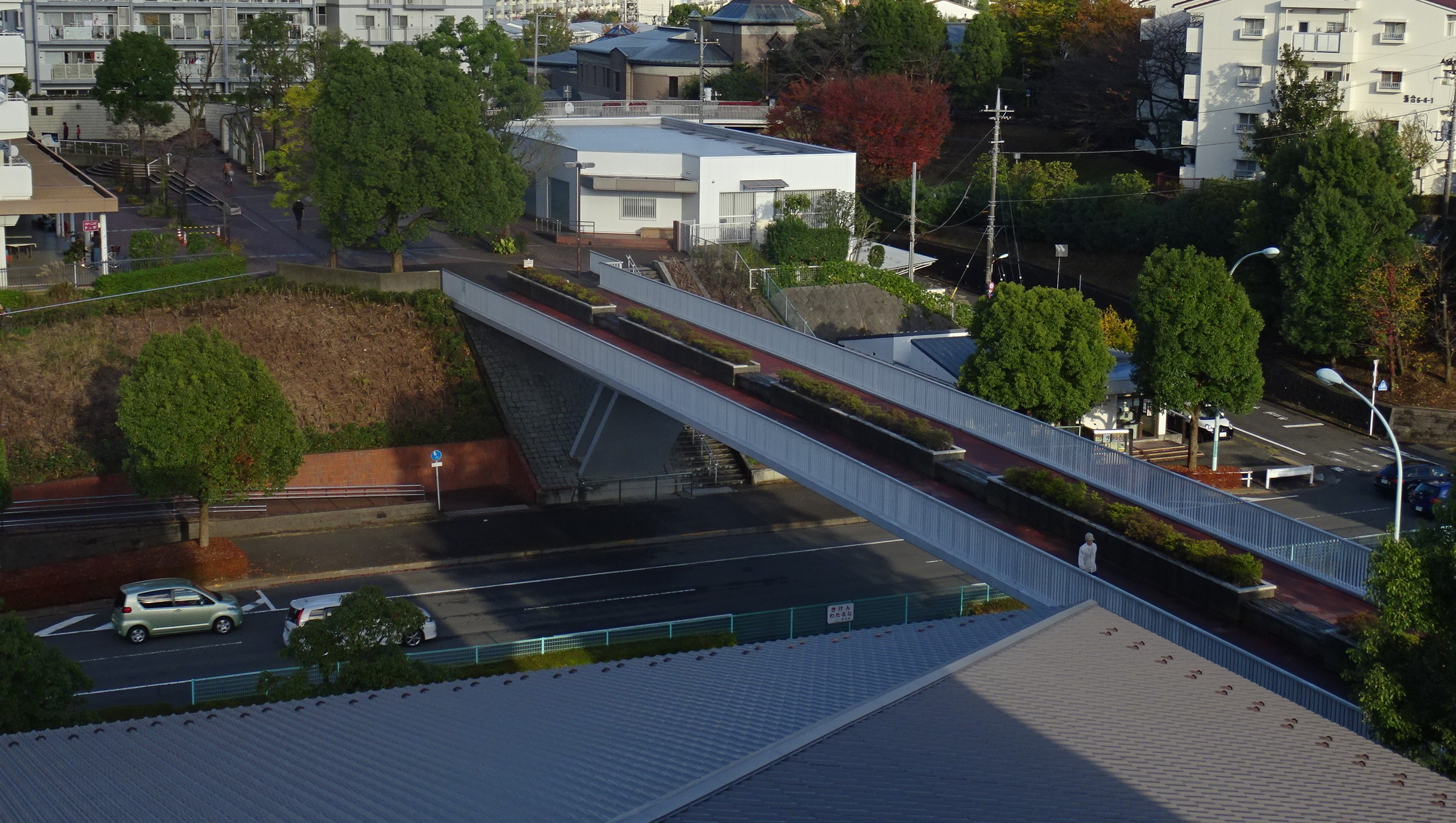 多摩ニュータウンにおける遊歩道と車道を立体交差にした歩車分離（2015/11/15撮影）